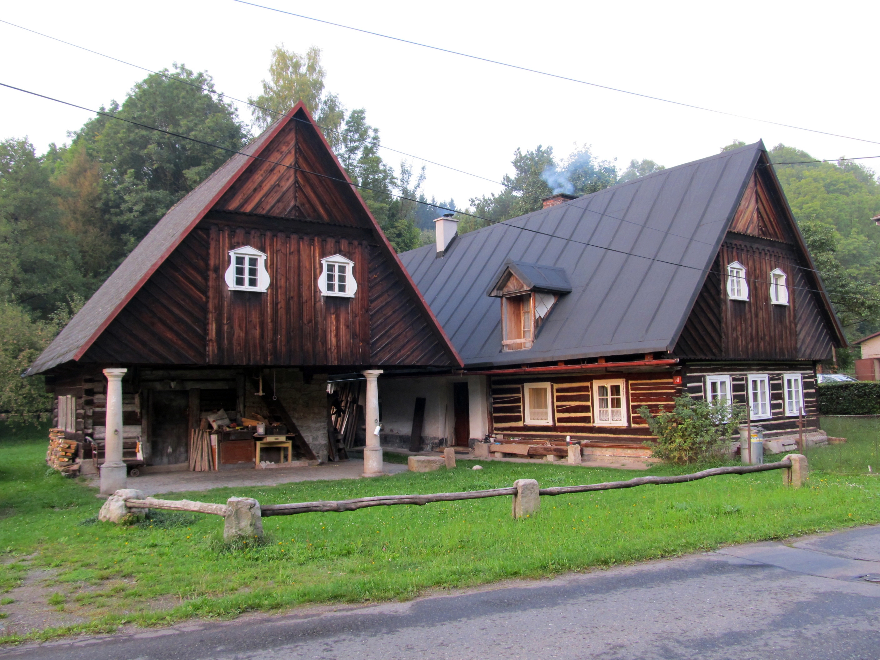 Kovárna (Nízká Srbská), u silnice z Bezděkova do Machova 47, Nízká Srbská